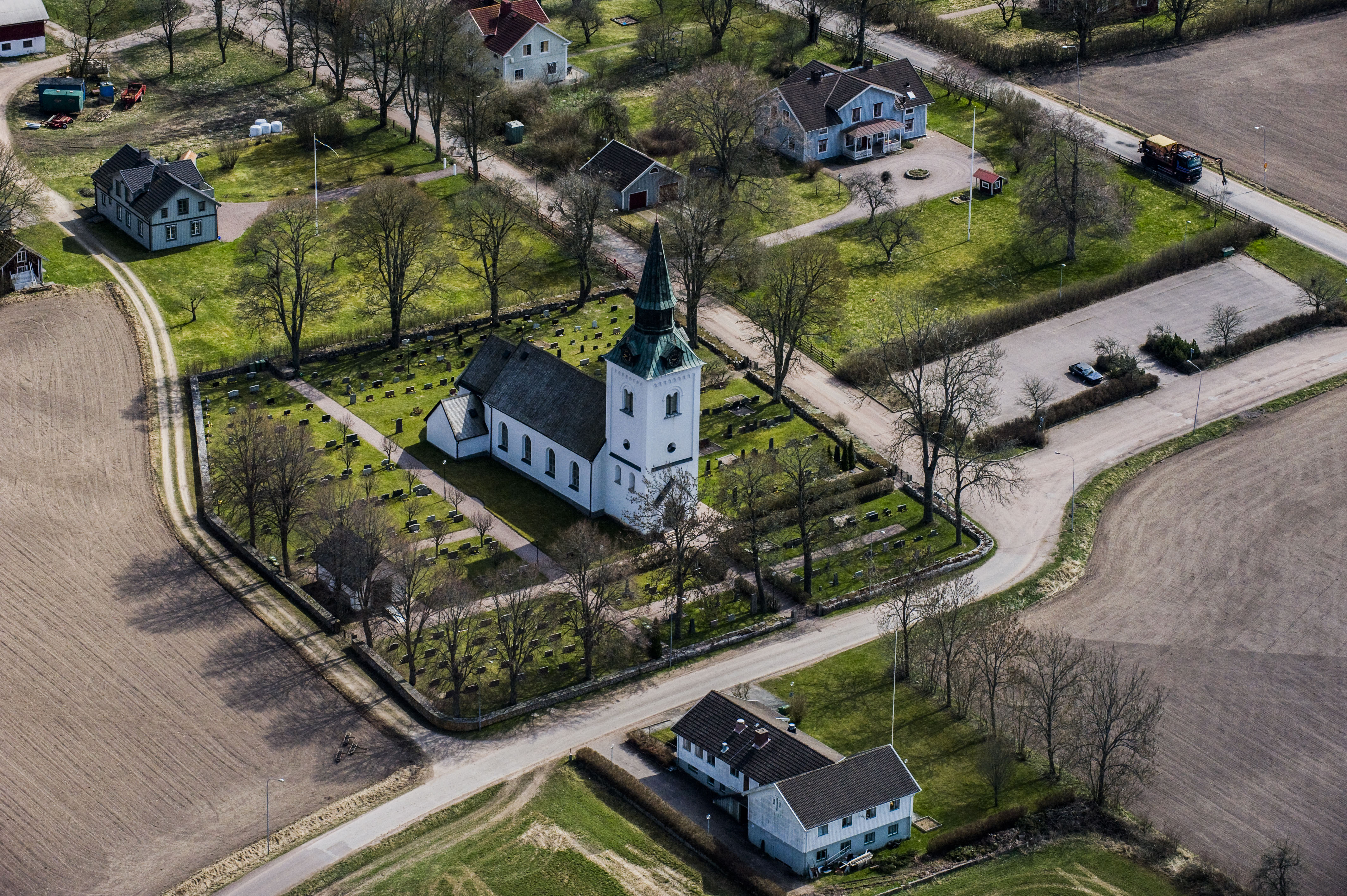 Frinnaryds kyrka från luften